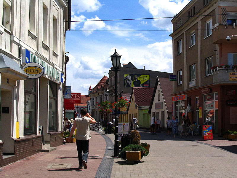 ulica 1 Maja (deptak) w Gostyniu.